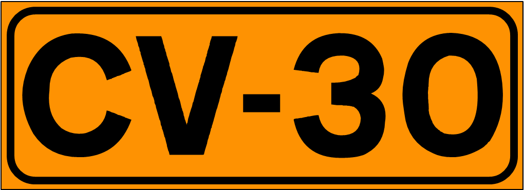 Inidcador de la Carretera de la Comunidad Valenciana CV-30